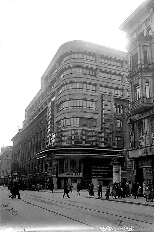 Wolkenkratzer in Berlin. Das grosse Zeitungshaus Mosse hat sein Gebäude aufstocken lassen; es ist somit das höchste Haus Berlins.